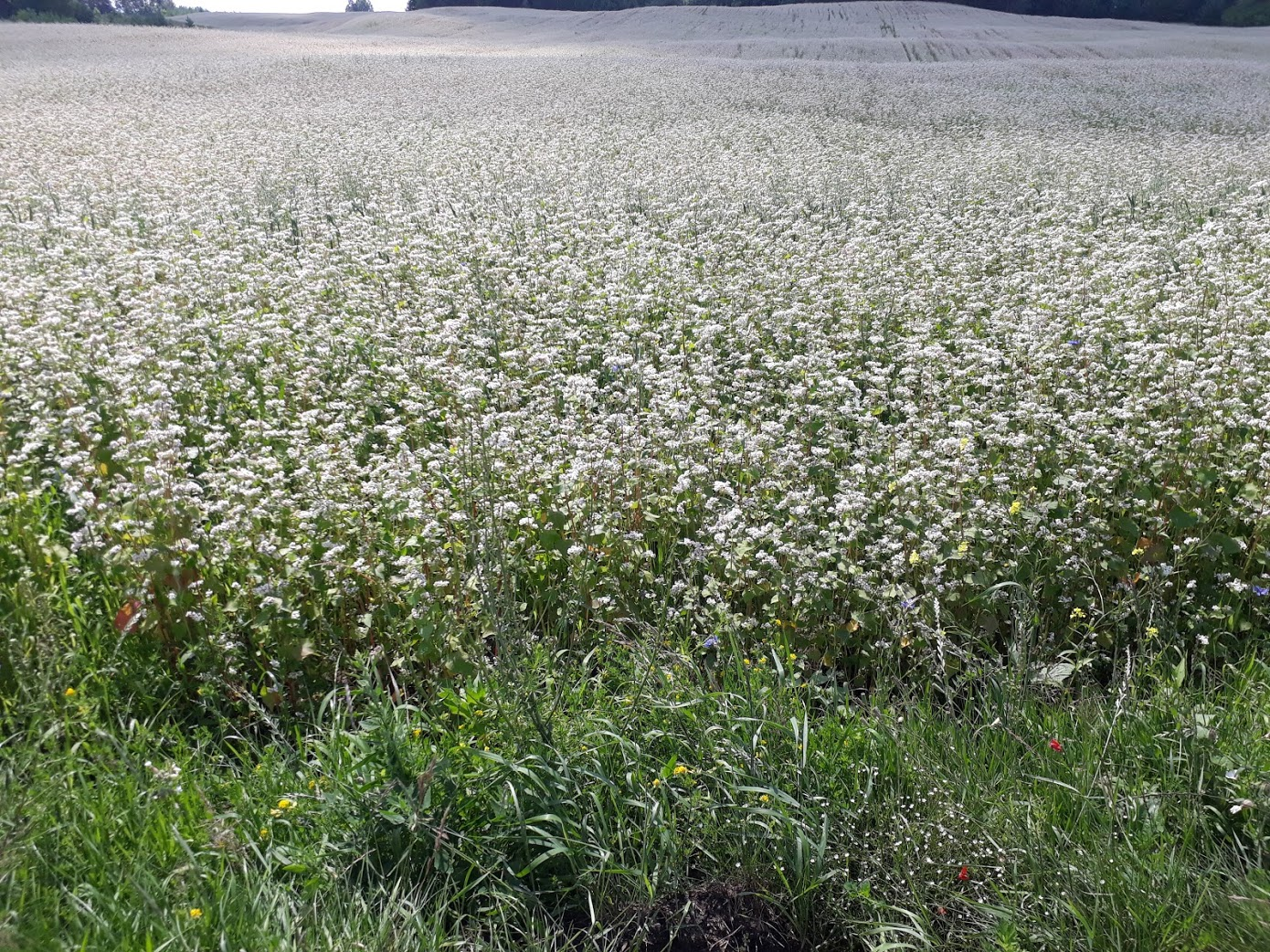 Grikių laukas